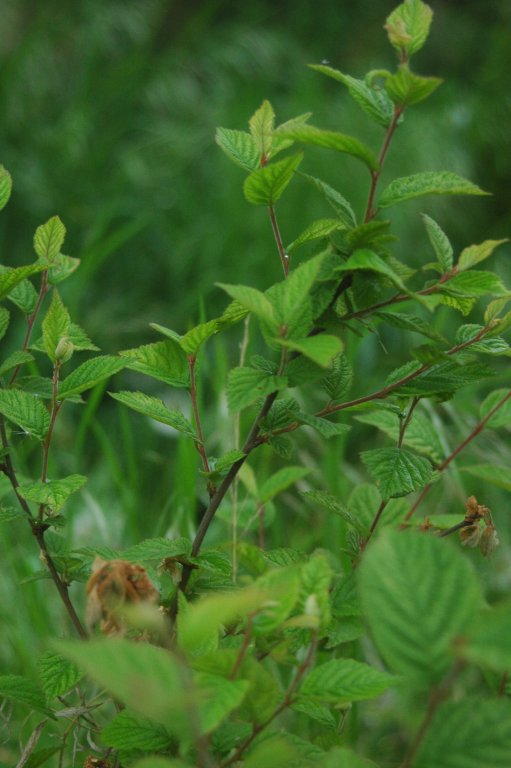 Prunus tomentosa